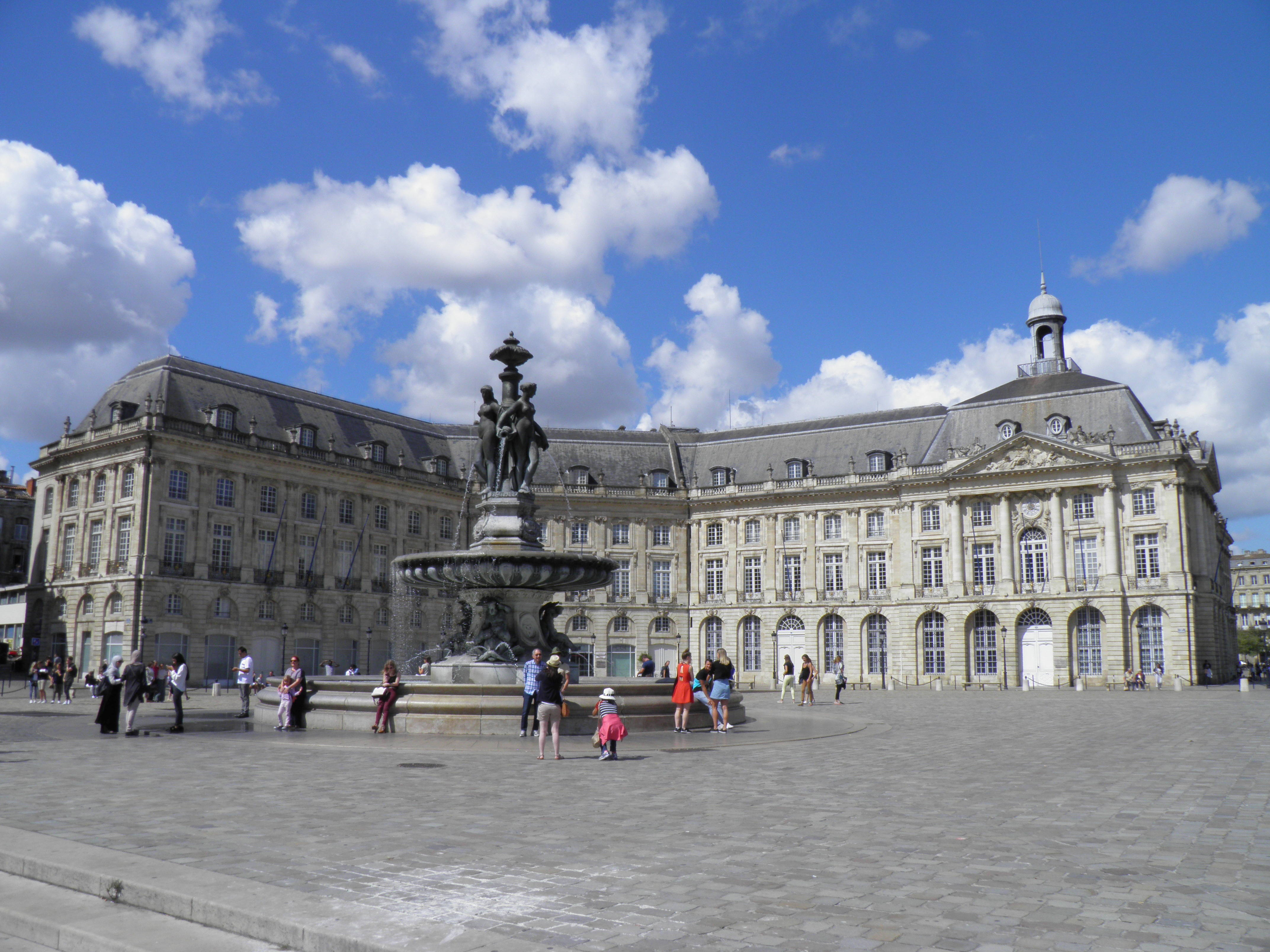 Place de la Bourse (numéros 12, 14, 16, 17, 18 et 18bis) et fontaine des Trois Grâces à Bordeaux (Gironde, France).